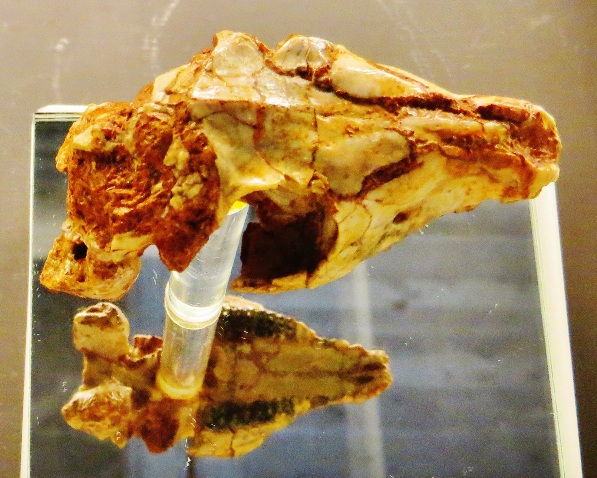 Took the picture at Jura-Museum, Eichstaett